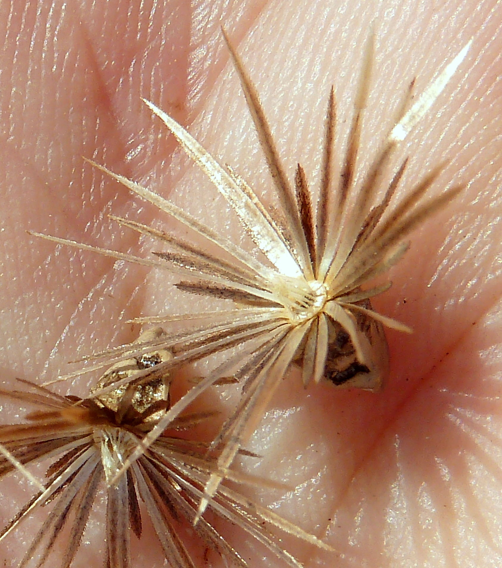 Carthamus lanatus : cipsela, detalle del apex y del vilano - Cabezo de Pallarés, Albatera (Alicante, España).